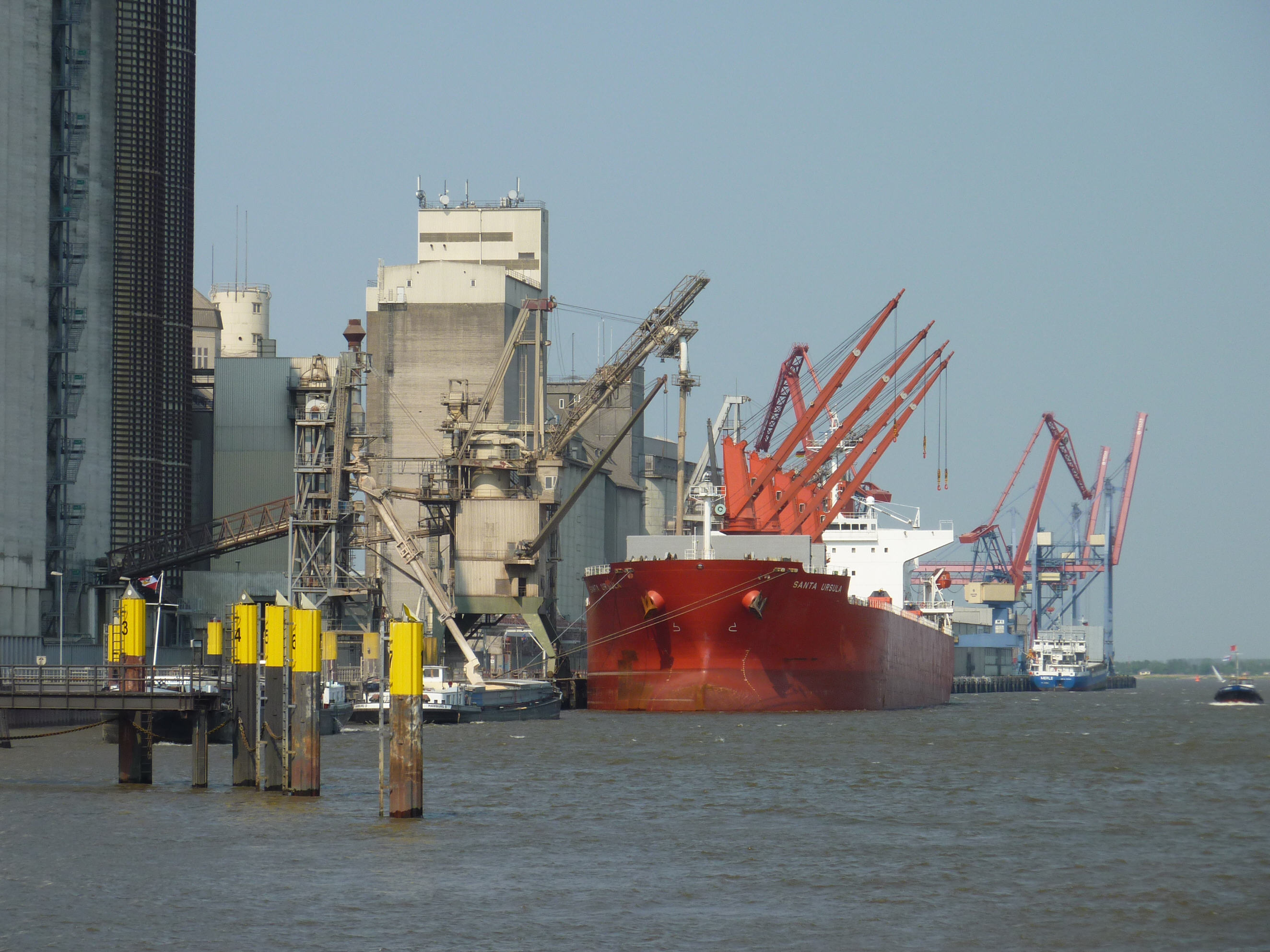 der Frachter "Santa Ursula" in Brake, im Hintergrund die Merle, ganz rechts vermutlich der Tanker "Hillrich Arnold"